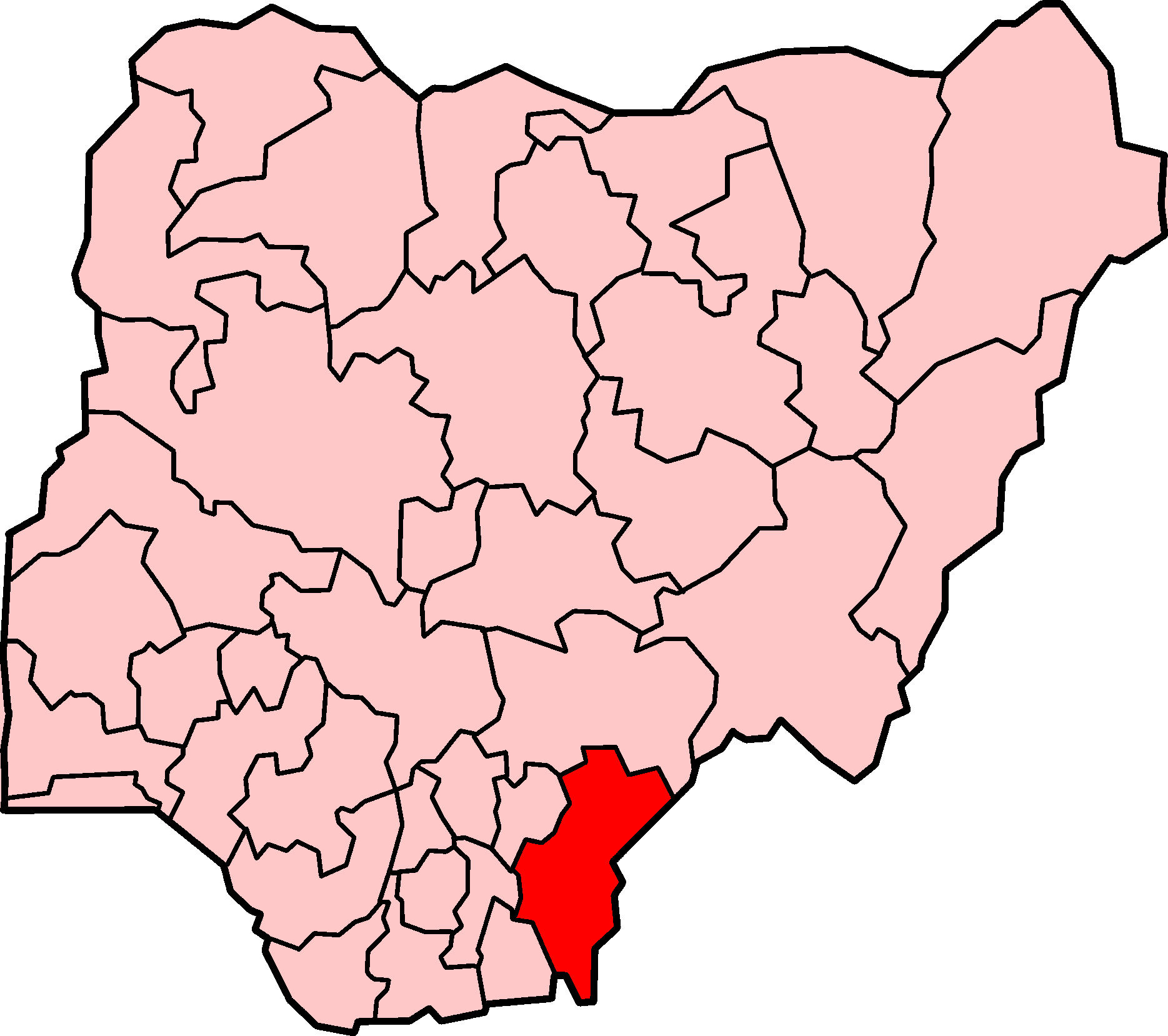 Localização do estado de Cross River na Nigéria.